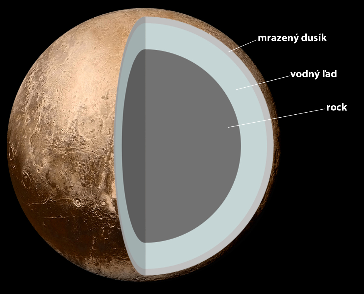 Predpokladaná vnútorná štruktúra Pluta: jadro zo silikátov, plášť z vody a kôra z metánu